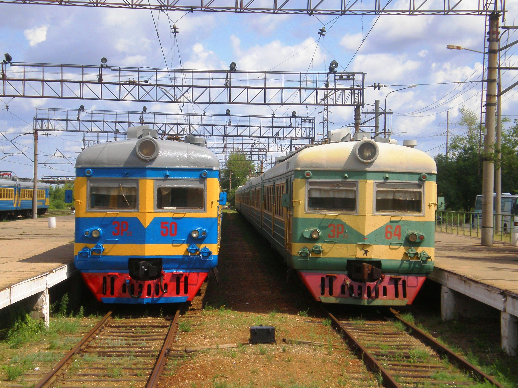 Электропоезда ЭР22-50 и ЭР22-64 на станции Степногорск